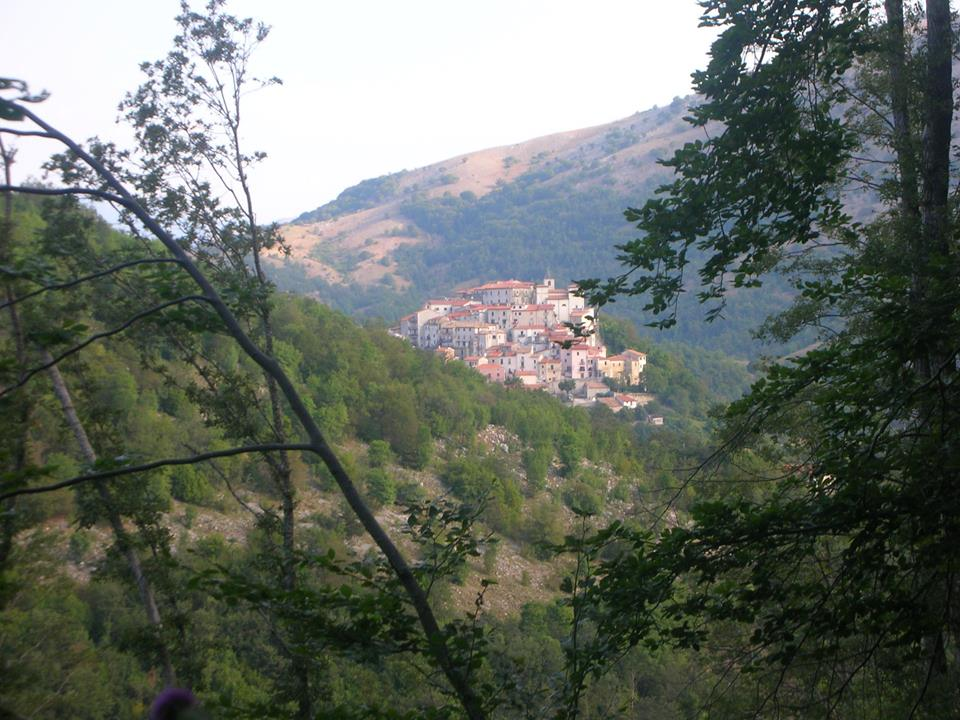 Il borgo tra i boschi